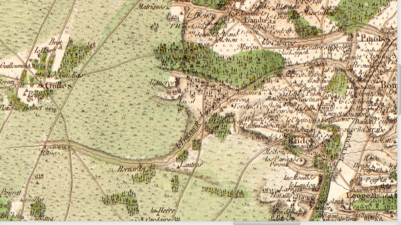 Carte de Cassini n°105 (Gironde, zoom sur le Tursan), 1756.